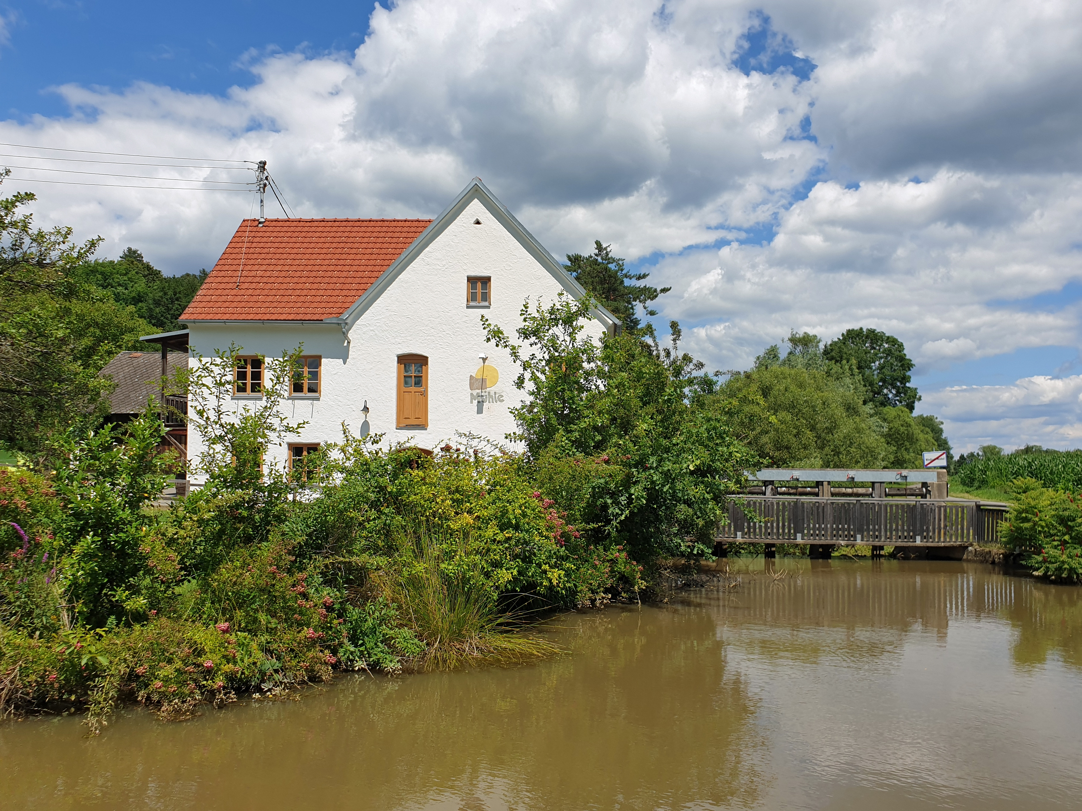 Jost Mühle